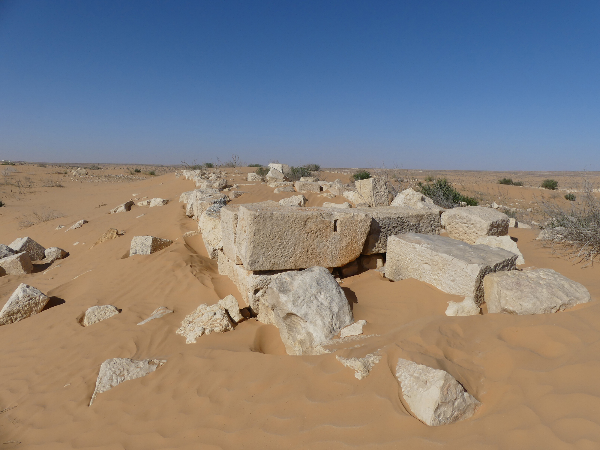 restes du site romain